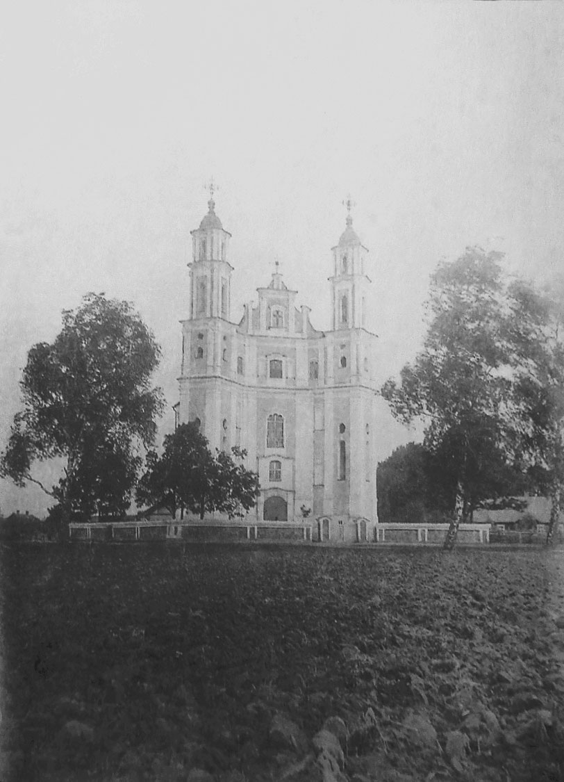 Беларуская (тарашкевіца): Лужкі (Łužki), вуліца Касьцельная (vulica Kaścielnaja). Касьцёл Сьвятога Міхала Арханёла пры кляштары піяраў